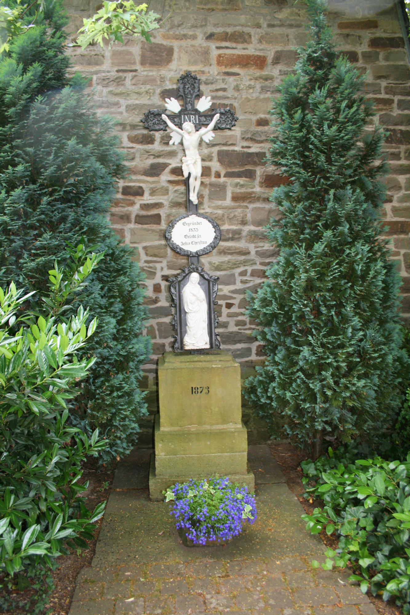 Dorfkreuz Merten, Eitorf